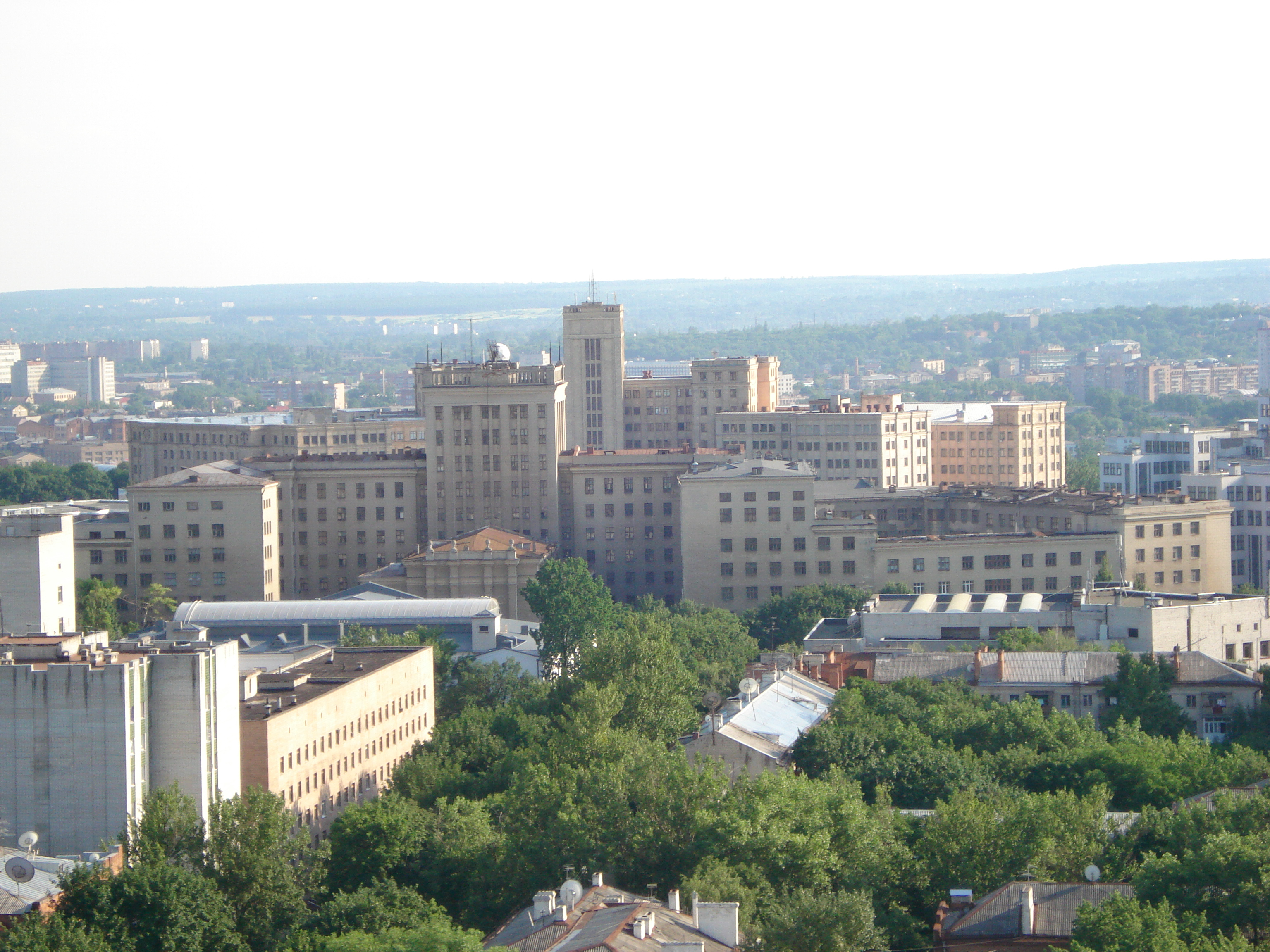 б. Академия им. Говорова (ВИРТА), за ней Харьковский университет. Вид с Шатиловки. Точка съёмки - отметка + 70 м